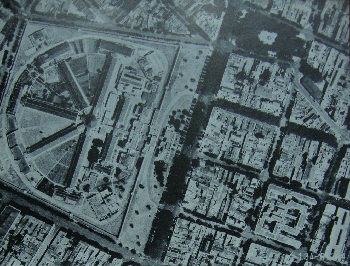 Vista a vuelo de pájaro del barrio de Palermo, en el sector actualmente conocido como Alto Palermo (por la cercanía del centro comercial homónimo). El gran predio de 11 hectáreas que domina la imagen es el de la Penitenciaría Nacional, demolida en 1962, actualmente Parque Las Heras. La zona era llamada "Tierra del Fuego" por la presencia del presidio. El camino ancho es la Avenida Las Heras.